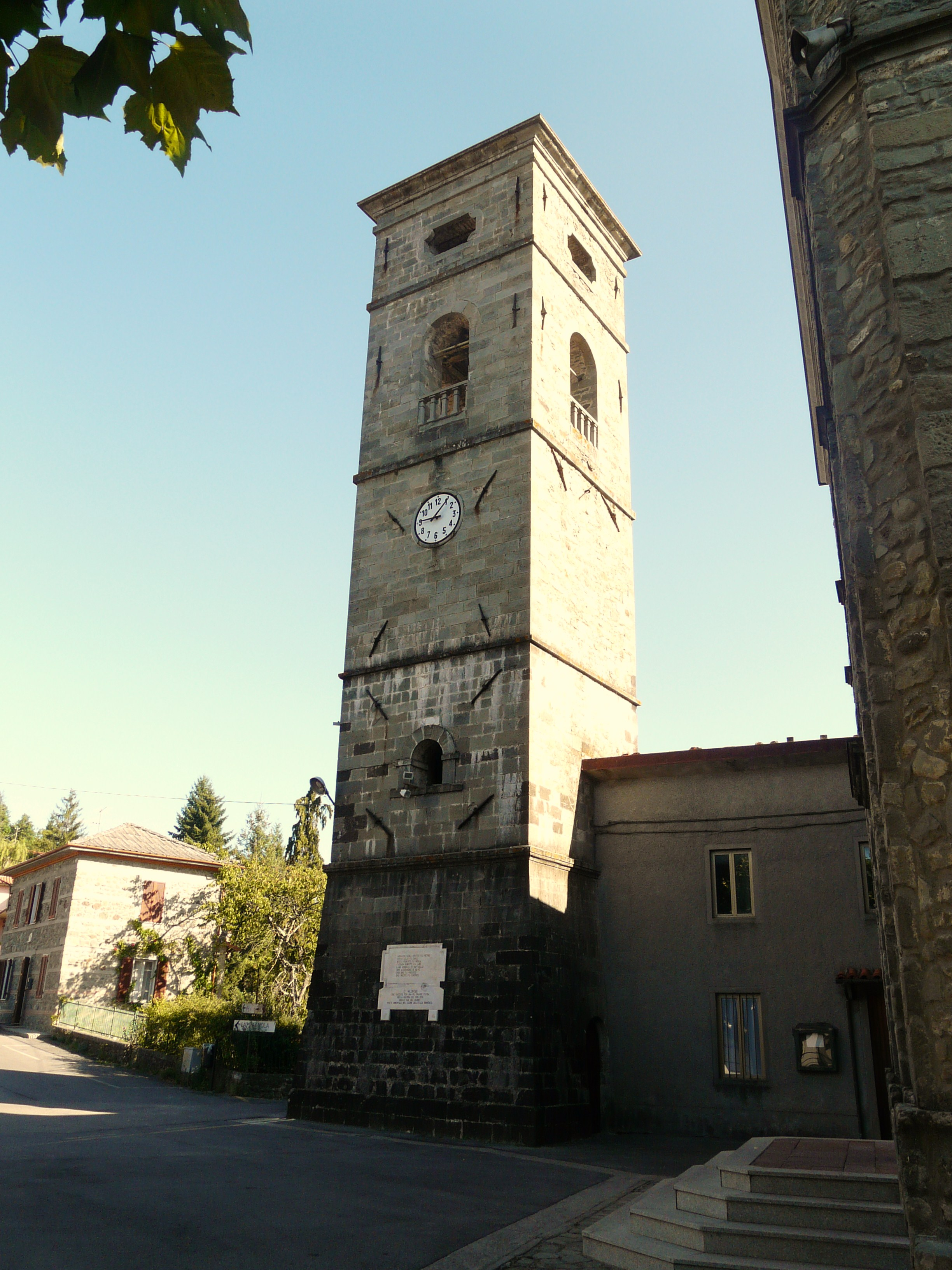 Chiesa di San Pietro, Piazza al Serchio, Toscana, Italia